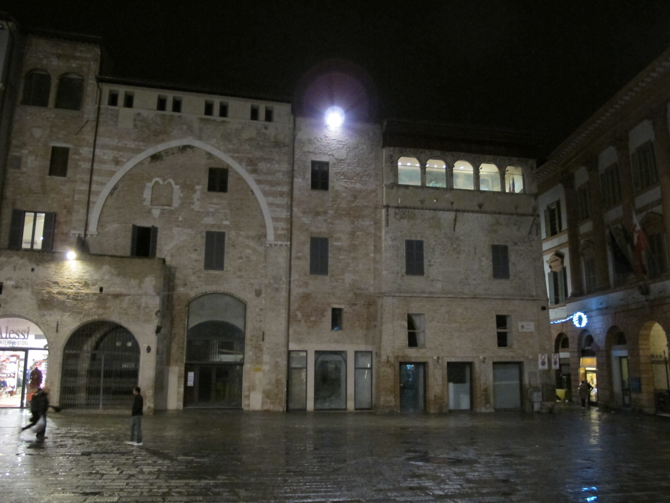 Foligno, piazza della repubblica